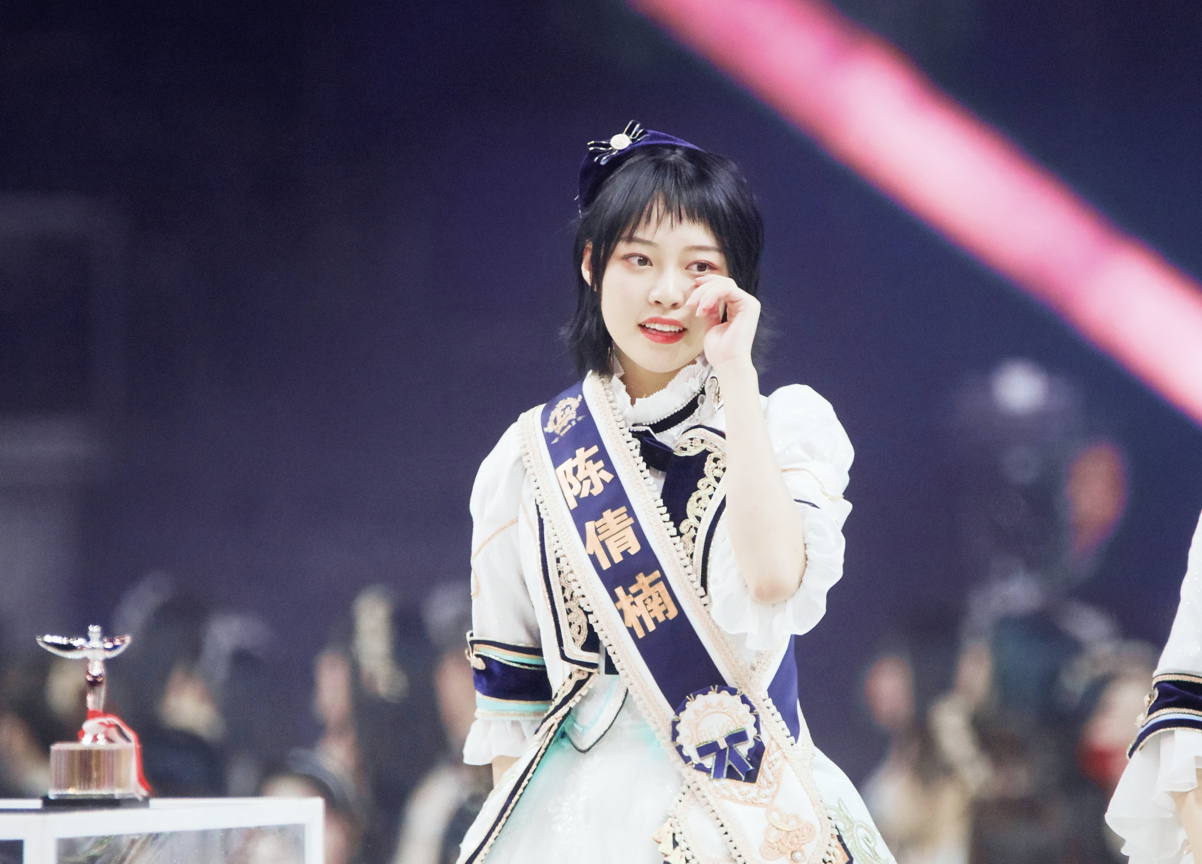 中文（中国大陆）: 陈倩楠SNH48 Group第五届总选举